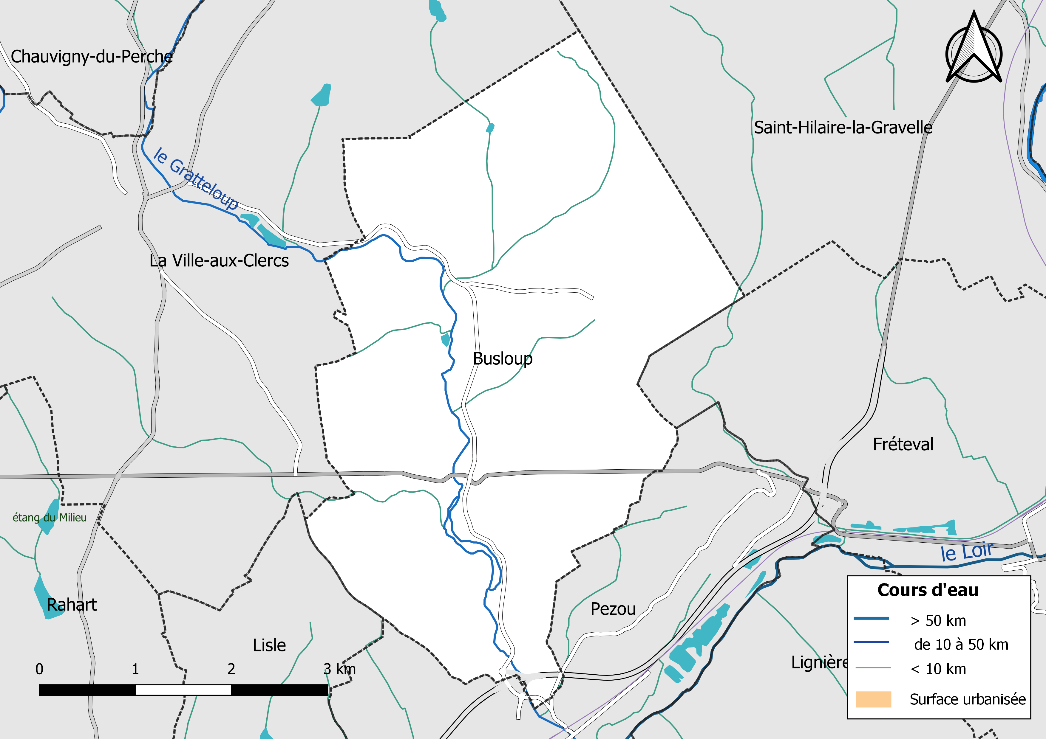 Carte du réseau hydrographique de la commune de Busloup (Loir-et-Cher, France).